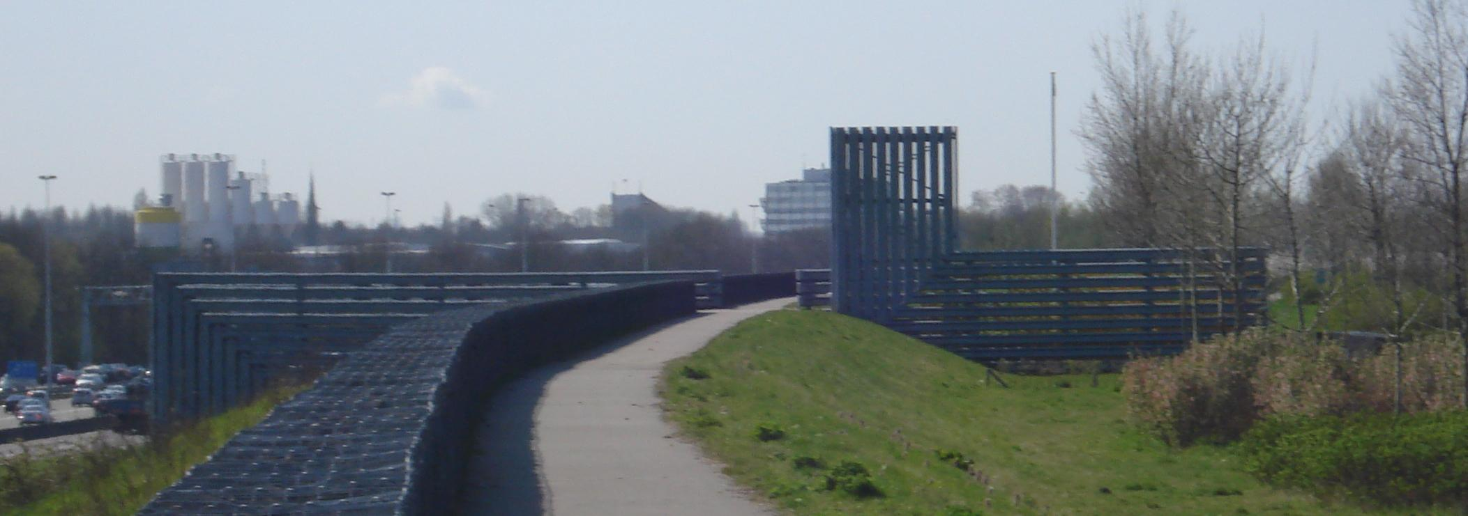 Rotterdam, Nieuw Terbregge, A20. Kunstwerk "Monument voor operatie Manna" van Observatorium. The Netherlands. The photographical reproduction of this work is covered under the article 18 of the Dutch copyright law, which states that “it is not an infringement of copyright to reproduce and publish pictures of a work, as meant in article 10, first paragraph, under 6°[1] or of an architectural work as meant in article 10, first paragraph, under 8°[2], which are made to be permanently located in a public place, as long as the work is depicted as it is located in the public space. Where incorporation of a work in a compilation is concerned, not more than a few of the works of the same author may be included”. [1] drawings, paintings, works of architecture and sculpture, lithographs, engravings and the likes [2] drafts, sketches and three-dimensional works relating to architecture, geography, topography or other sciences Note that photographs are not included in Item 6. They are separately listed at Item 9 and are therefore not covered by FOP. See COM:CRT/Netherlands#Freedom of panorama for more information. .